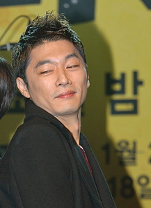 Mnet '김옥빈의 오케이 펑크' 쇼케이스